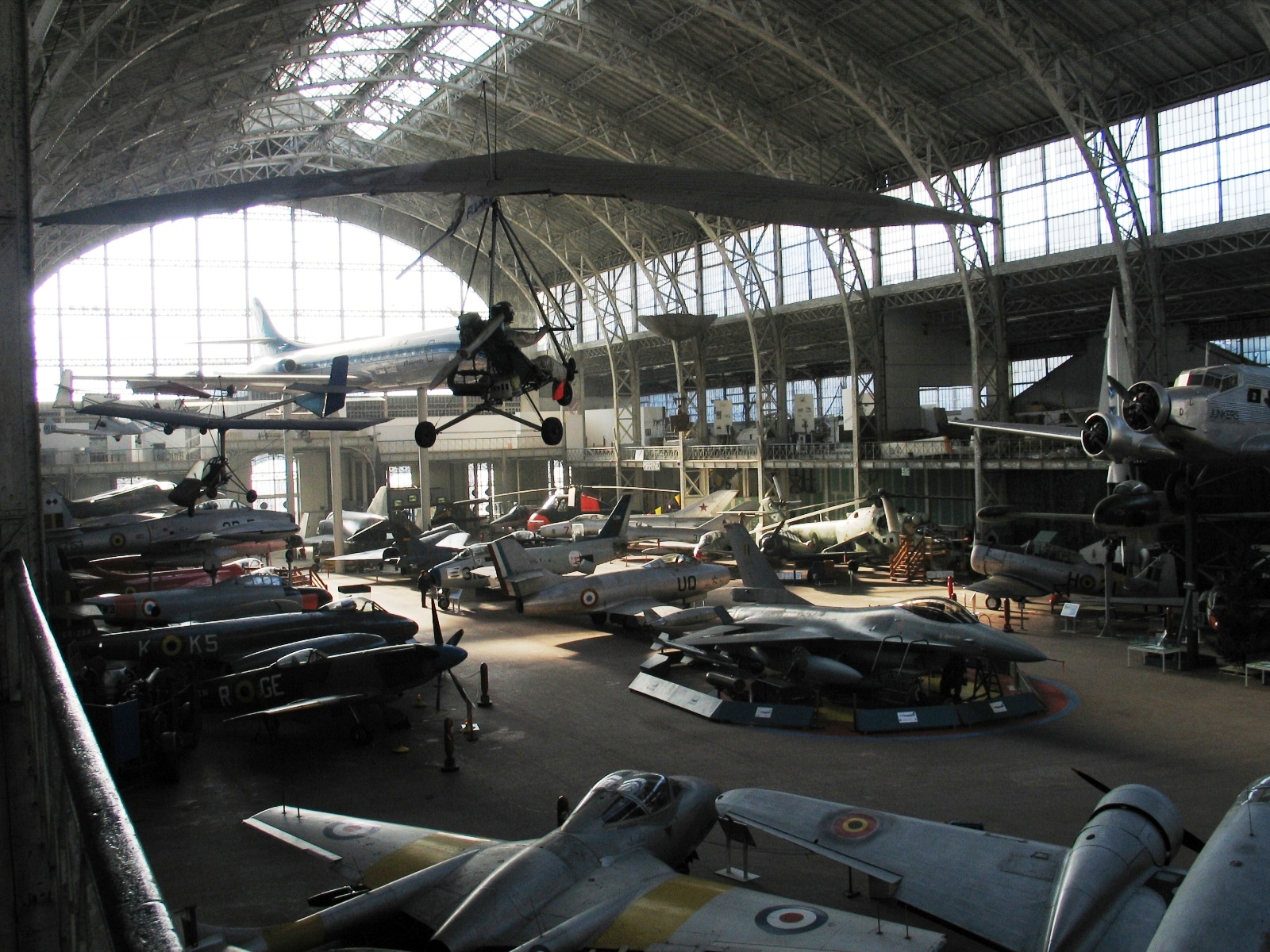 Koninklijk Museum van het Leger en de Krijgsgeschiedenis - eigen foto